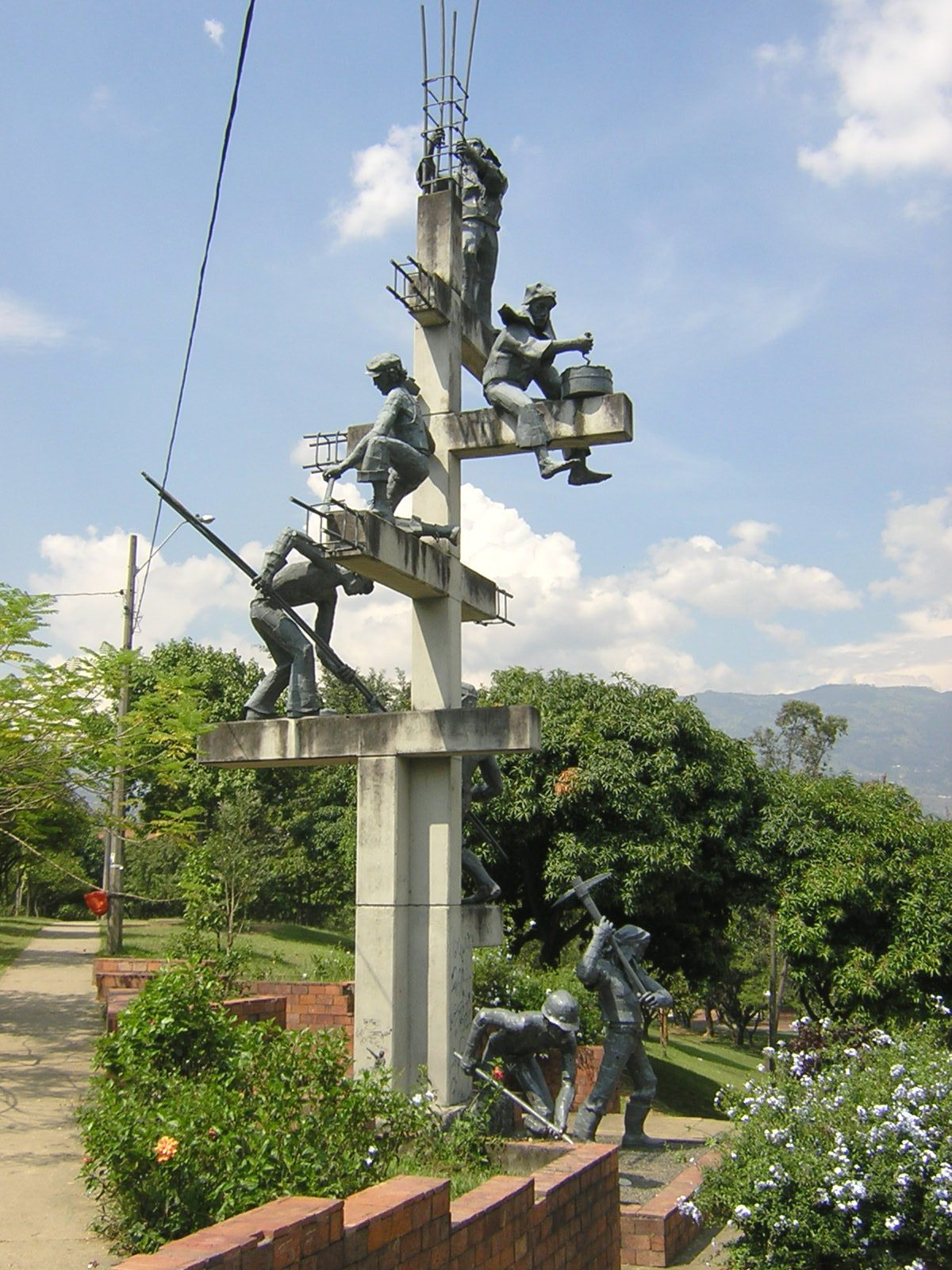 " Los Obreros", Escultura de Justo Arosemena, ubicado en el Parque de la Urbanización Nueva Villa del Aburra, Medellín, Colombia.